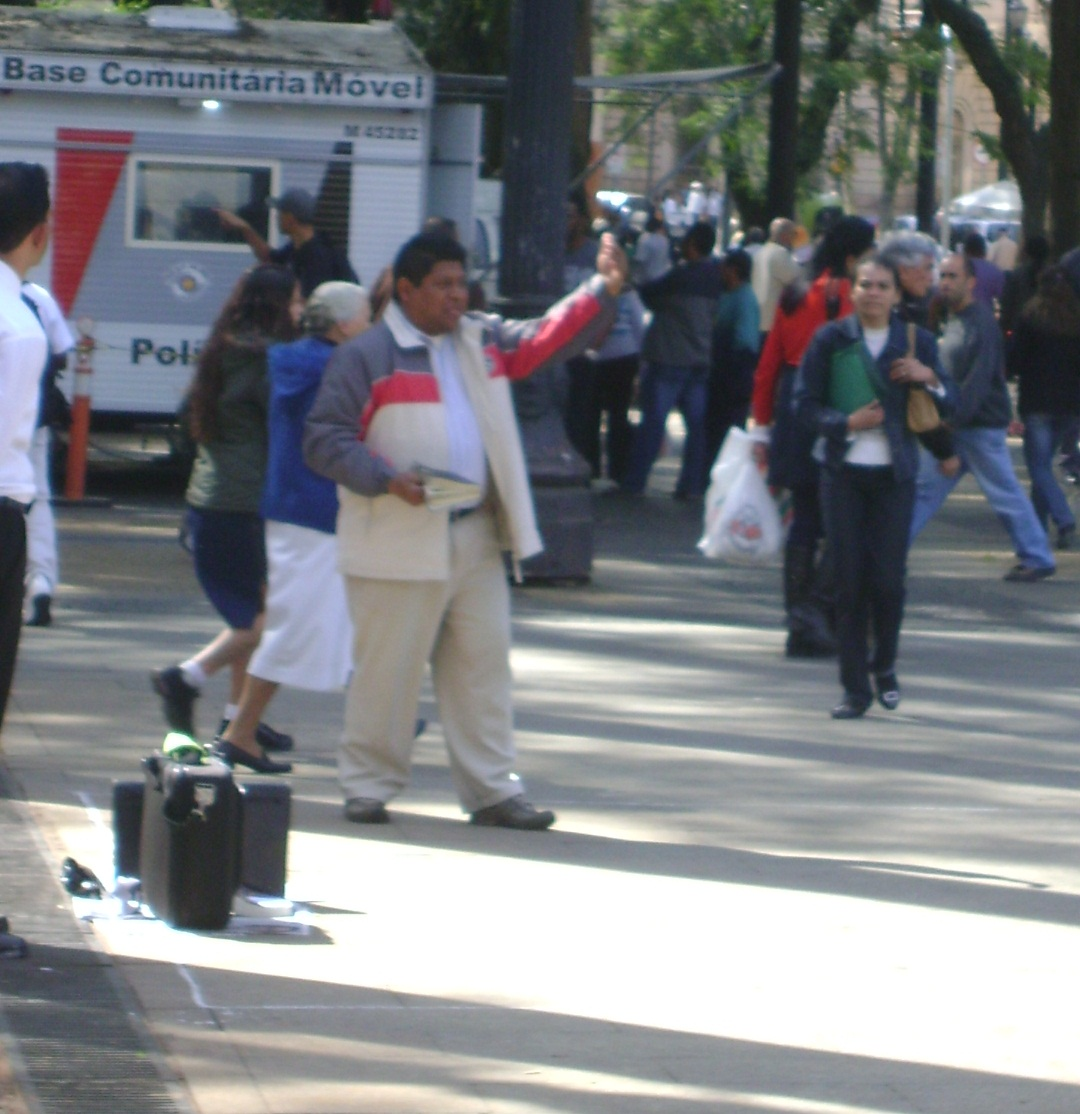 Predicador en la Praça da Sé, Sao Paulo, Brasil